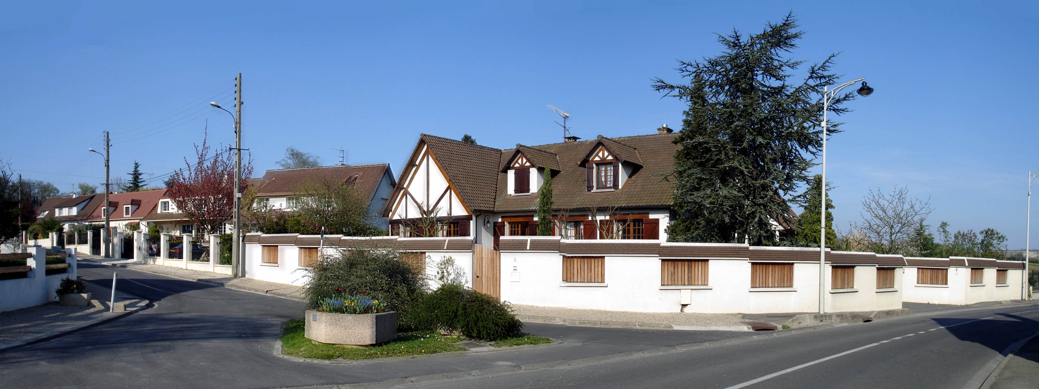 Rue du Verger à Courtry (Seine-et-Marne), France